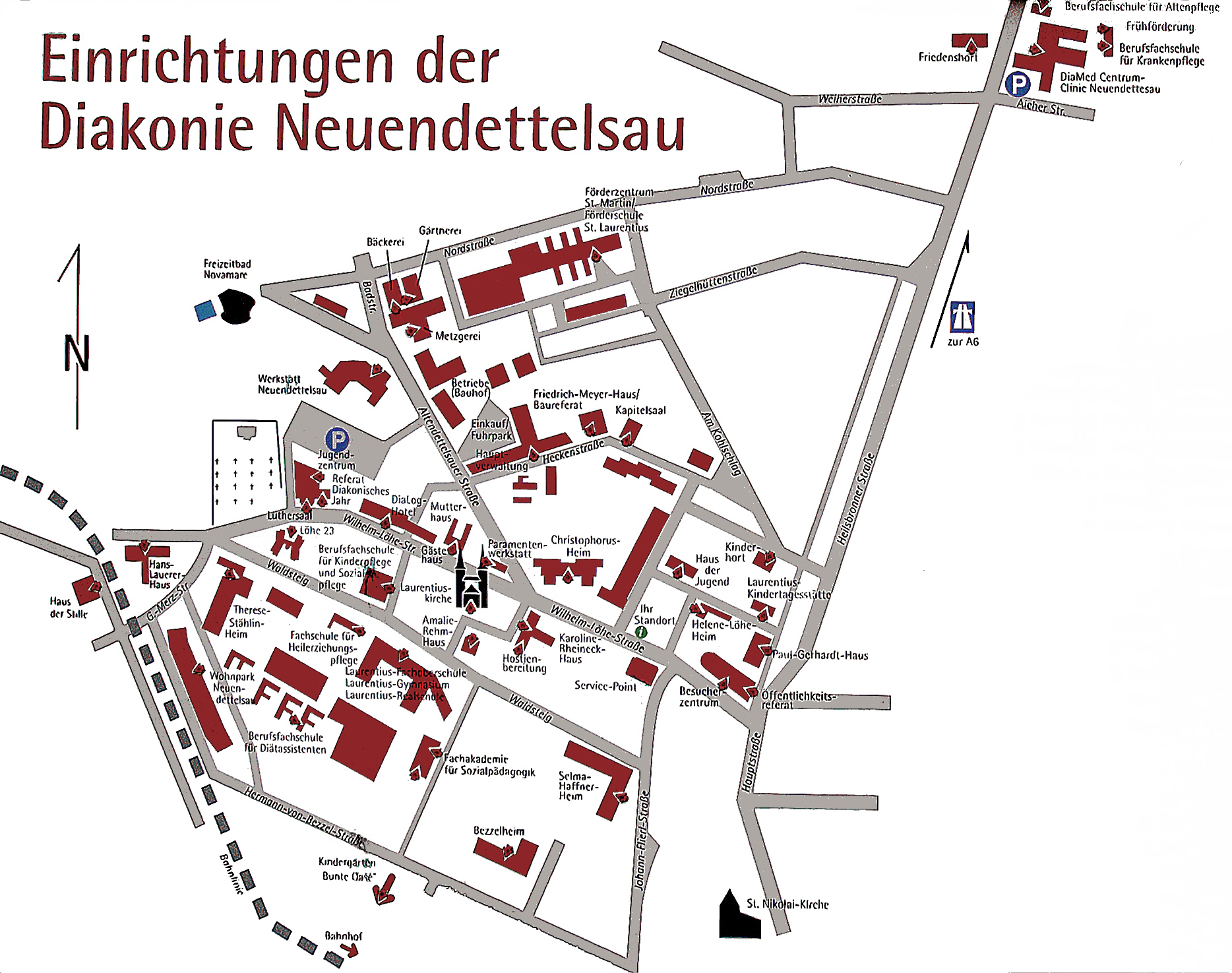 Einrichtungen der Diakonie Neuendettelsau (bearbeitete Fotografie des Lageplans)